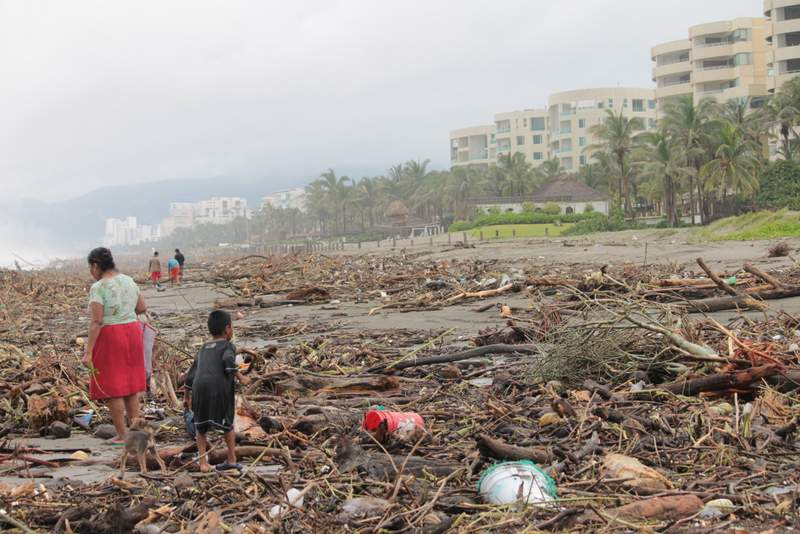 Estragos causados por el Huracán Ingrid y tormenta Manuel. En la zona diamante (Acapulco, Guerrero).